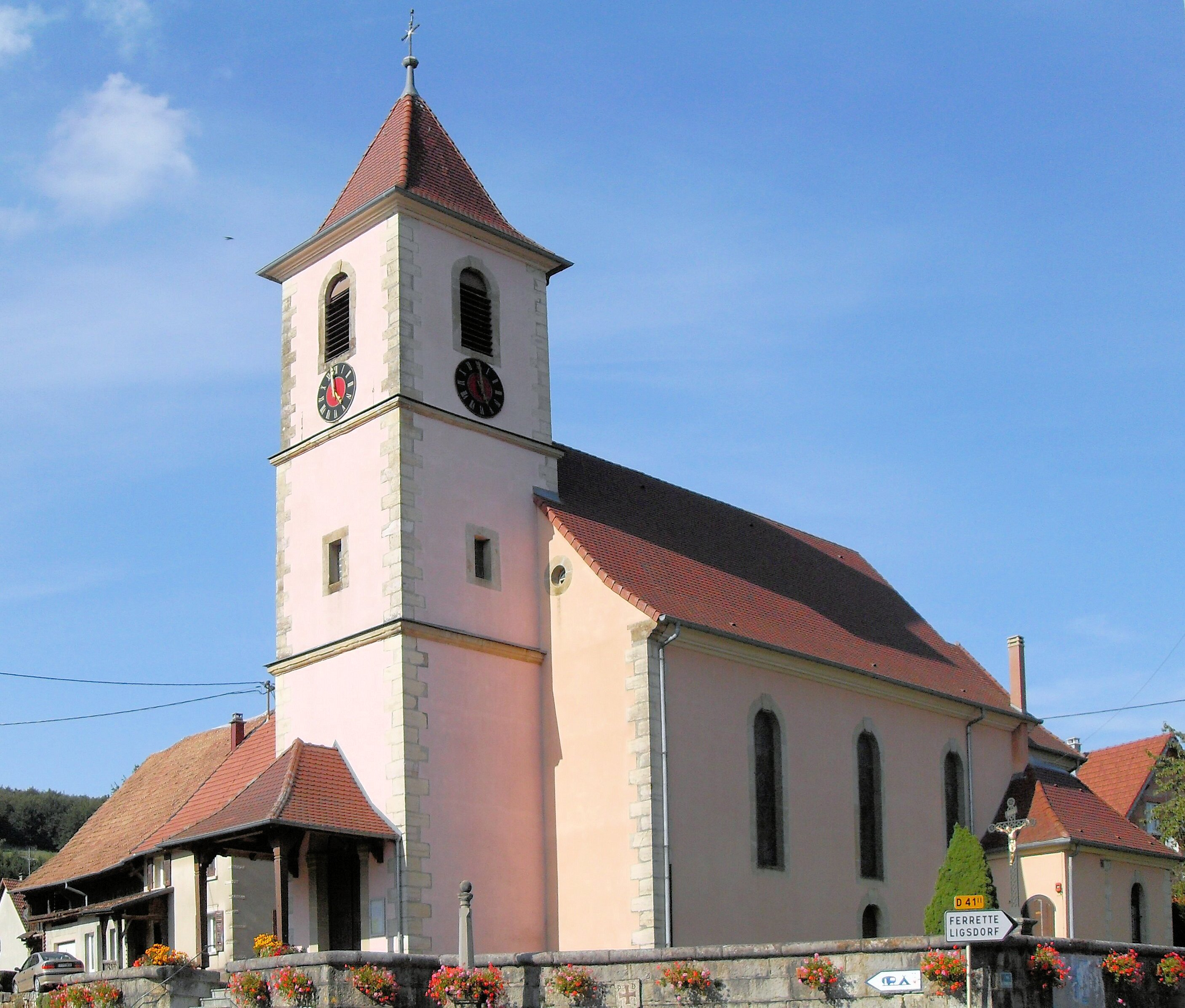 L'eglise de l'Exaltation de la Sainte-Croix à Bendorf